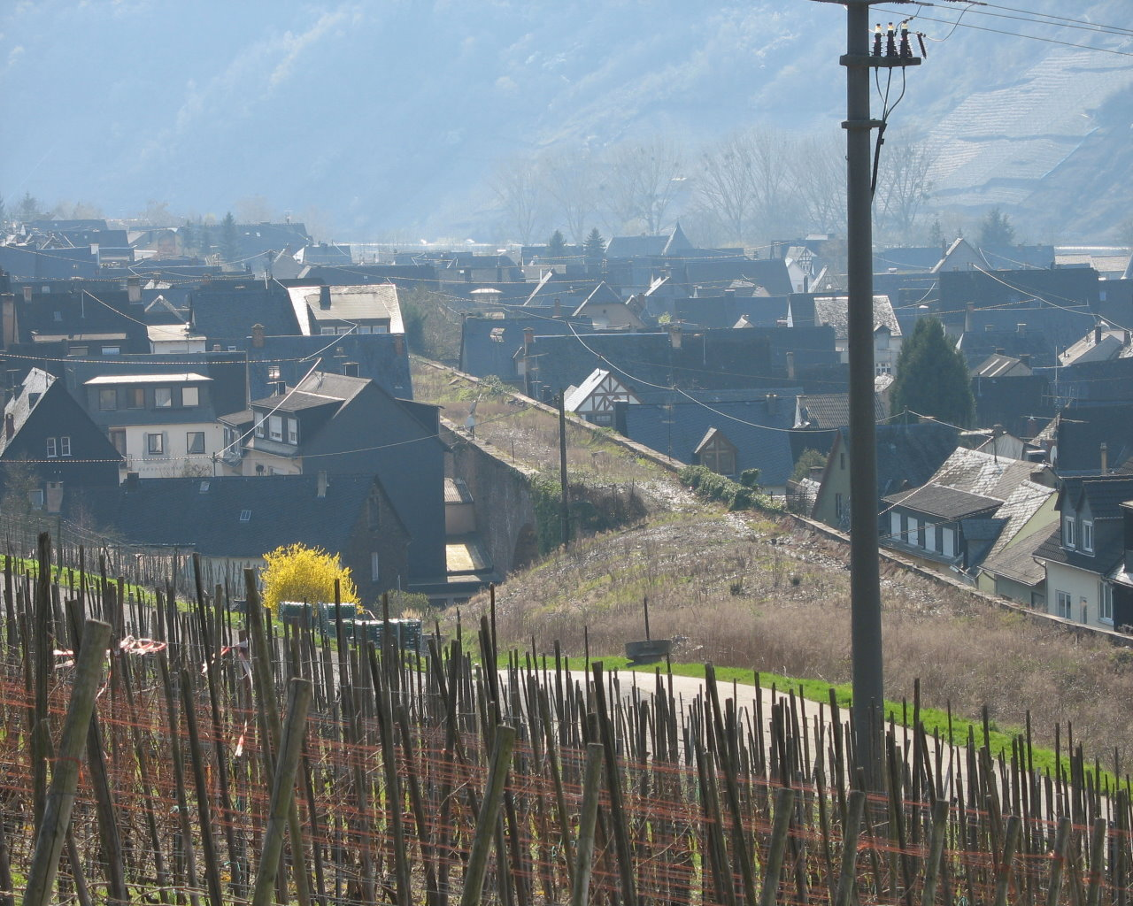 Bahndamm der geplanten Bahnlinie der rechten Moselstrecke bei Bruttig